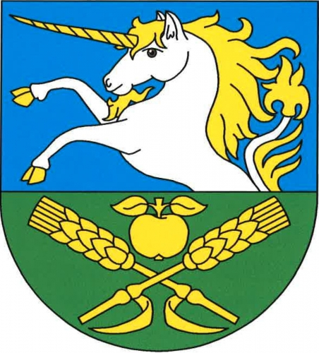 Znak, Horní Beřkovice, okres Litoměřice